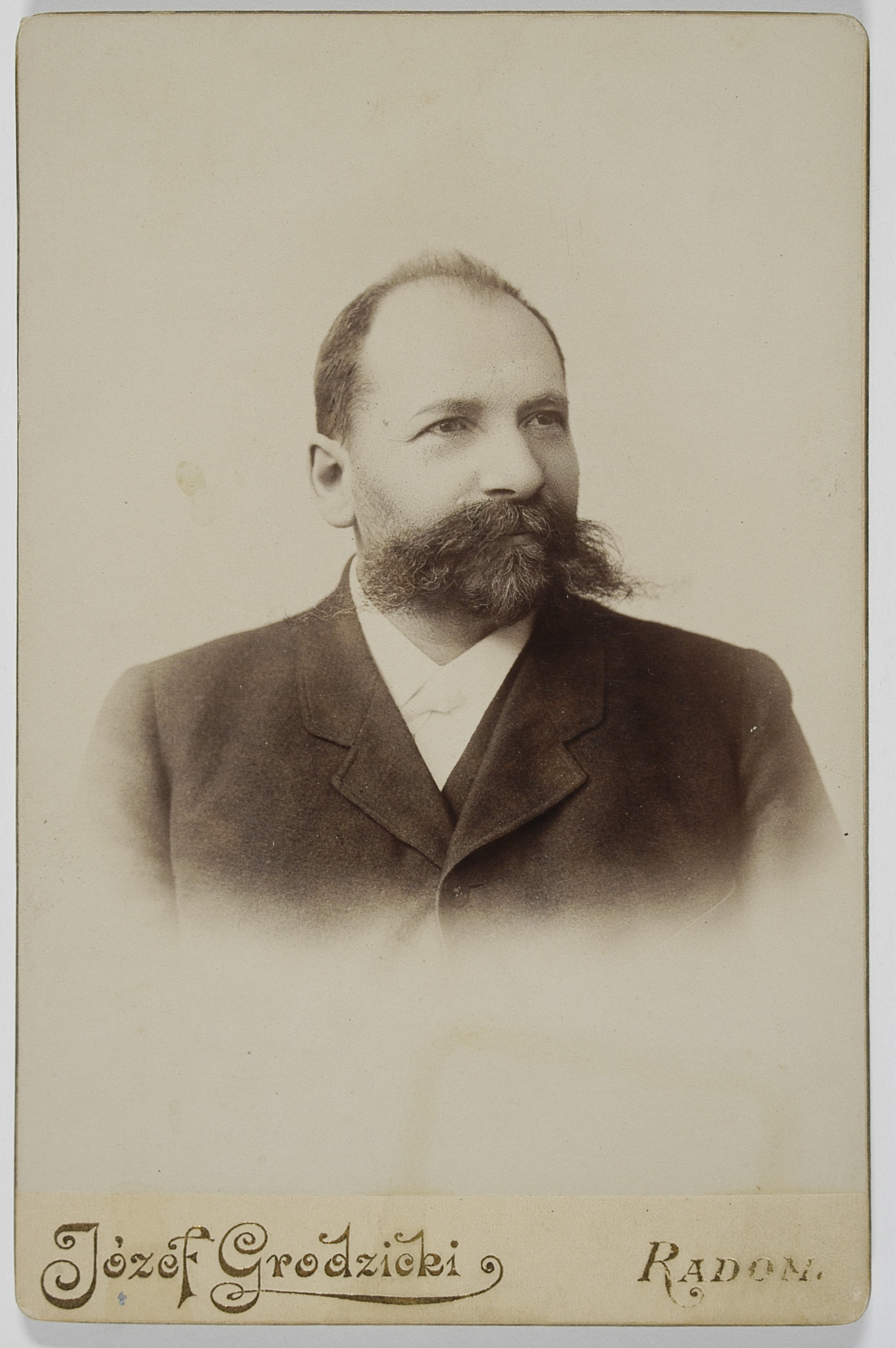 Józef Grodzicki, 1902 r.